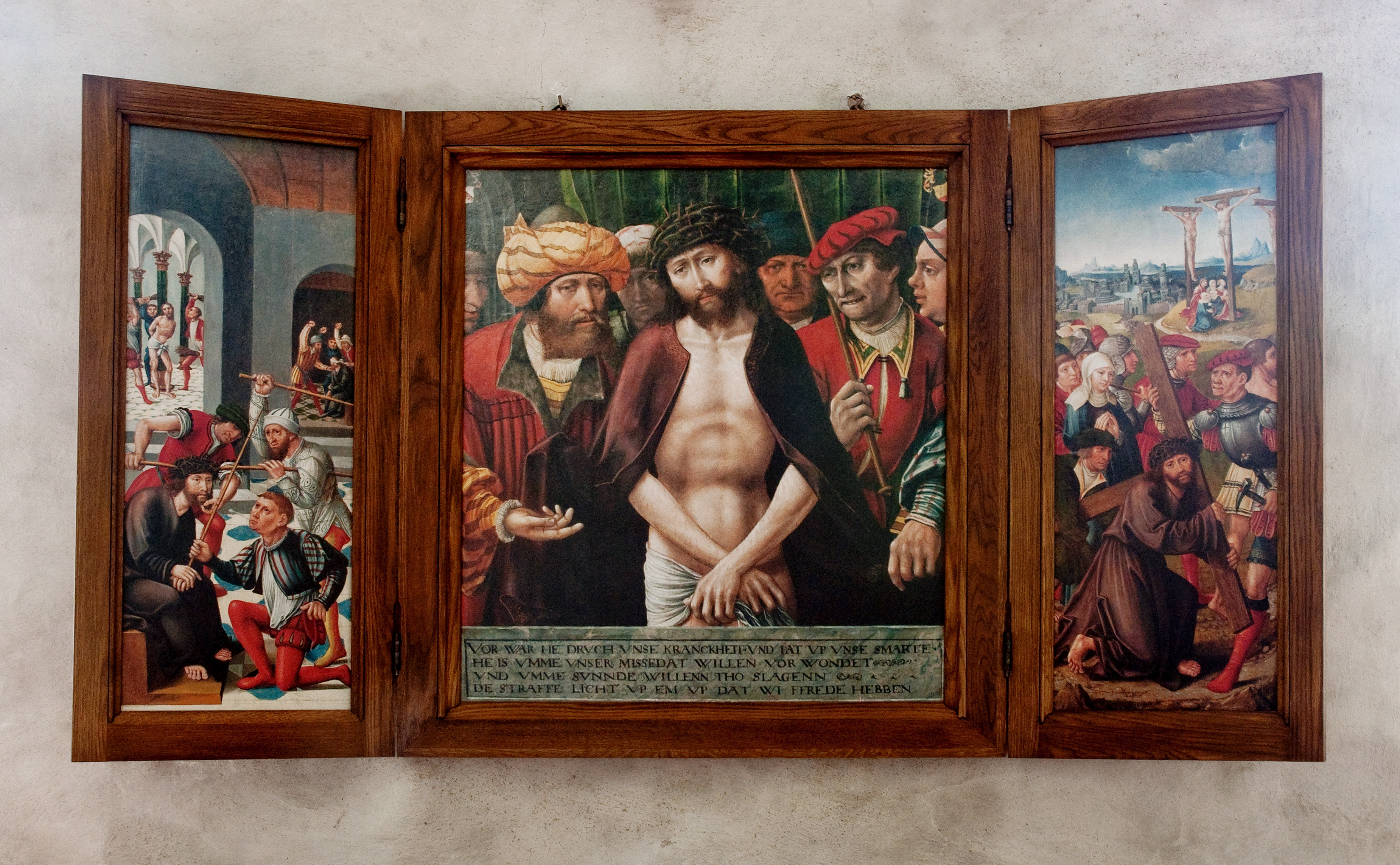 Triptyk.